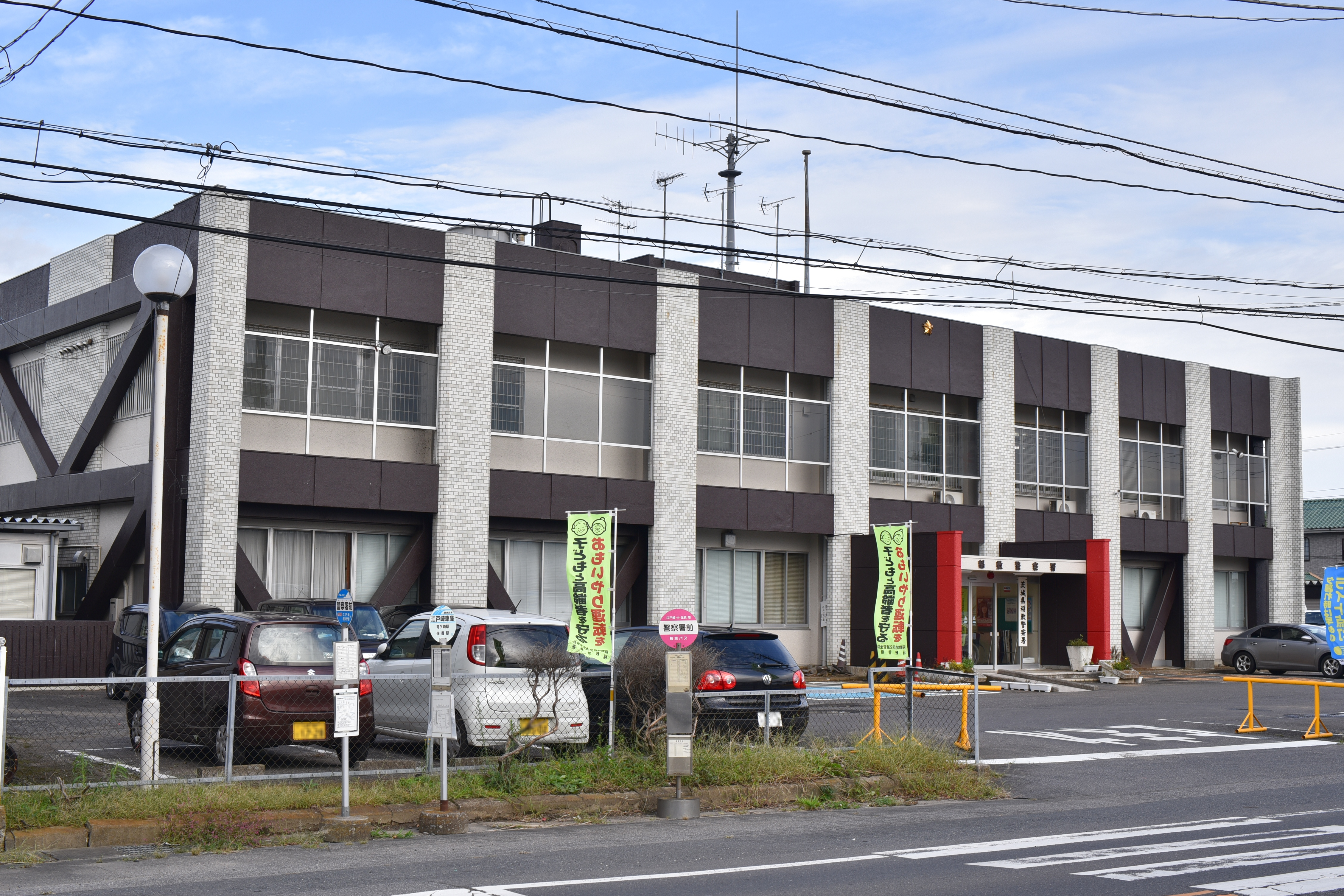 稲敷市高田にある稲敷警察署庁舎。旧称は、江戸崎警察署。